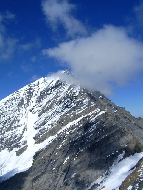 Beschreibung: Die Balmhorn-Südflanke vom Ferdenrothorn aus gesehen Quelle: Fotografiert von Benutzer:Telnet im August 2005 Lizenz: GNU-FDL